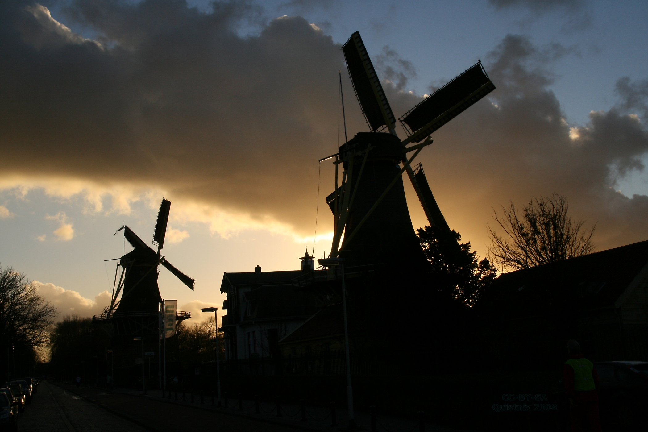 Rotterdam-Kralingen, windmolens De Ster (links) en De Lelie (rechts). Tegenlichtopname